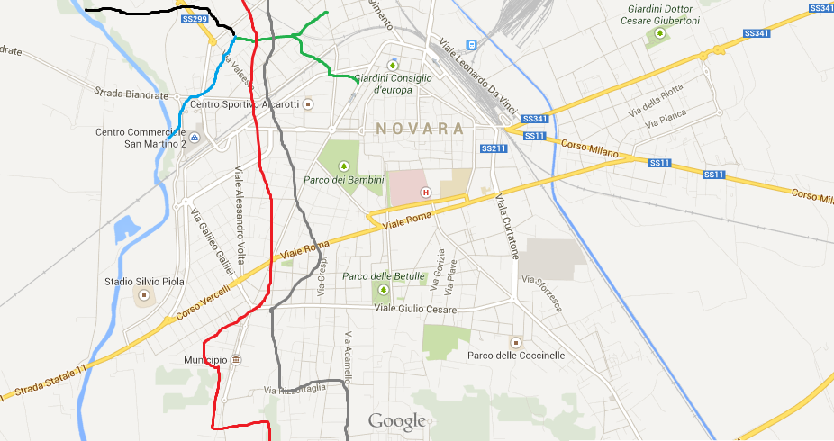 Rogge della città di Novara (Channels of Novara